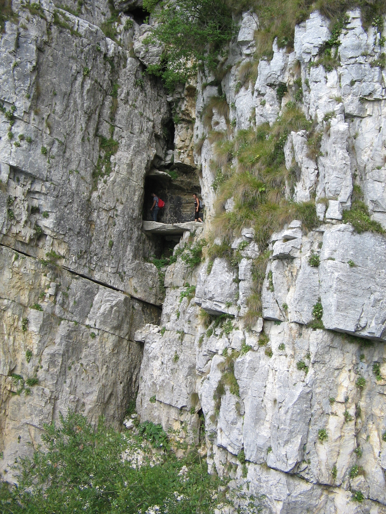 Passage at the 15th tunnel, Strada delle Gallerie, Pasubio